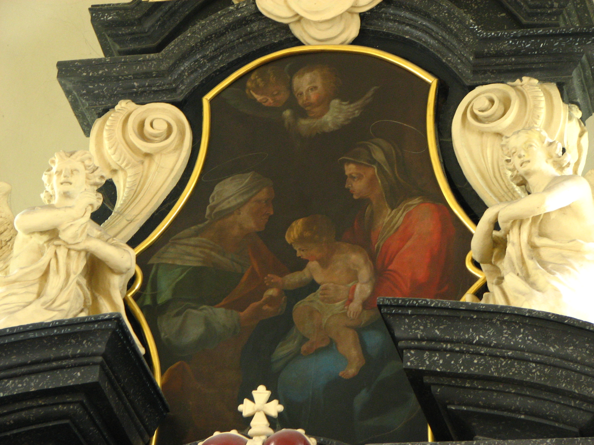 Biała Podlaska, kościół św. Anny, obraz - św. Anna z Maryją i Jezusem.